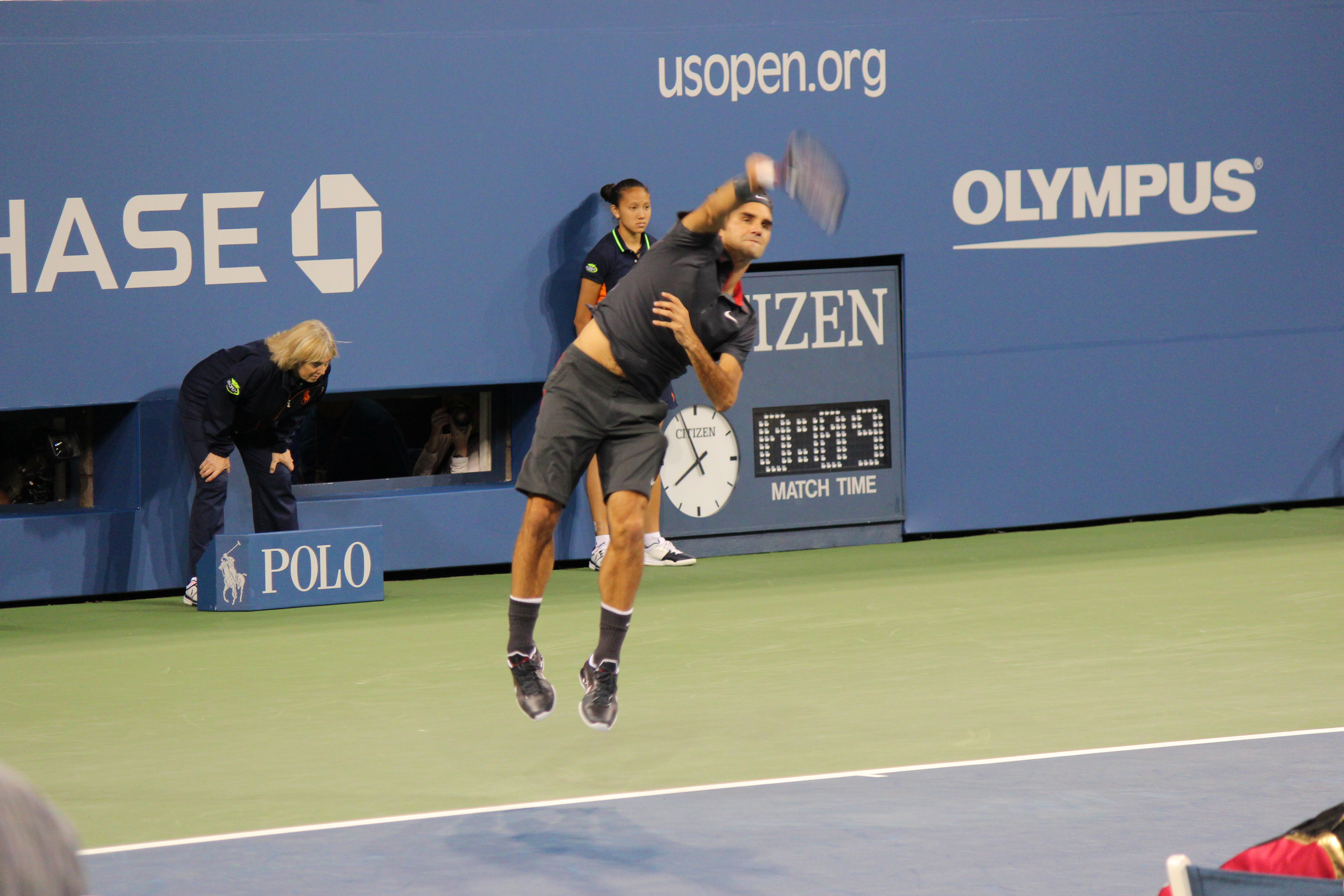 Roger Federer serving during a night match.